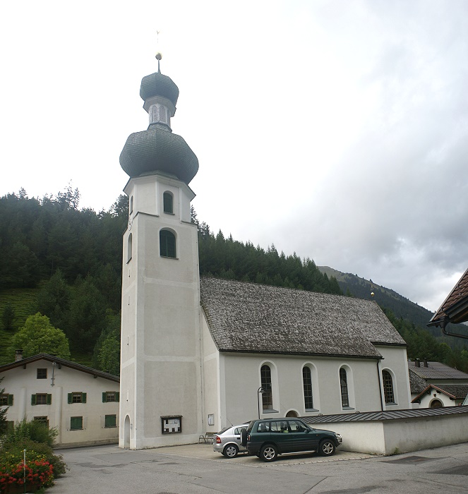 Kath. Filialkirche hll. Sebastian und Rochus, Friedhof mit Kapelle und Kriegerdenkmal, Hägerau. Gemeinde Steeg.